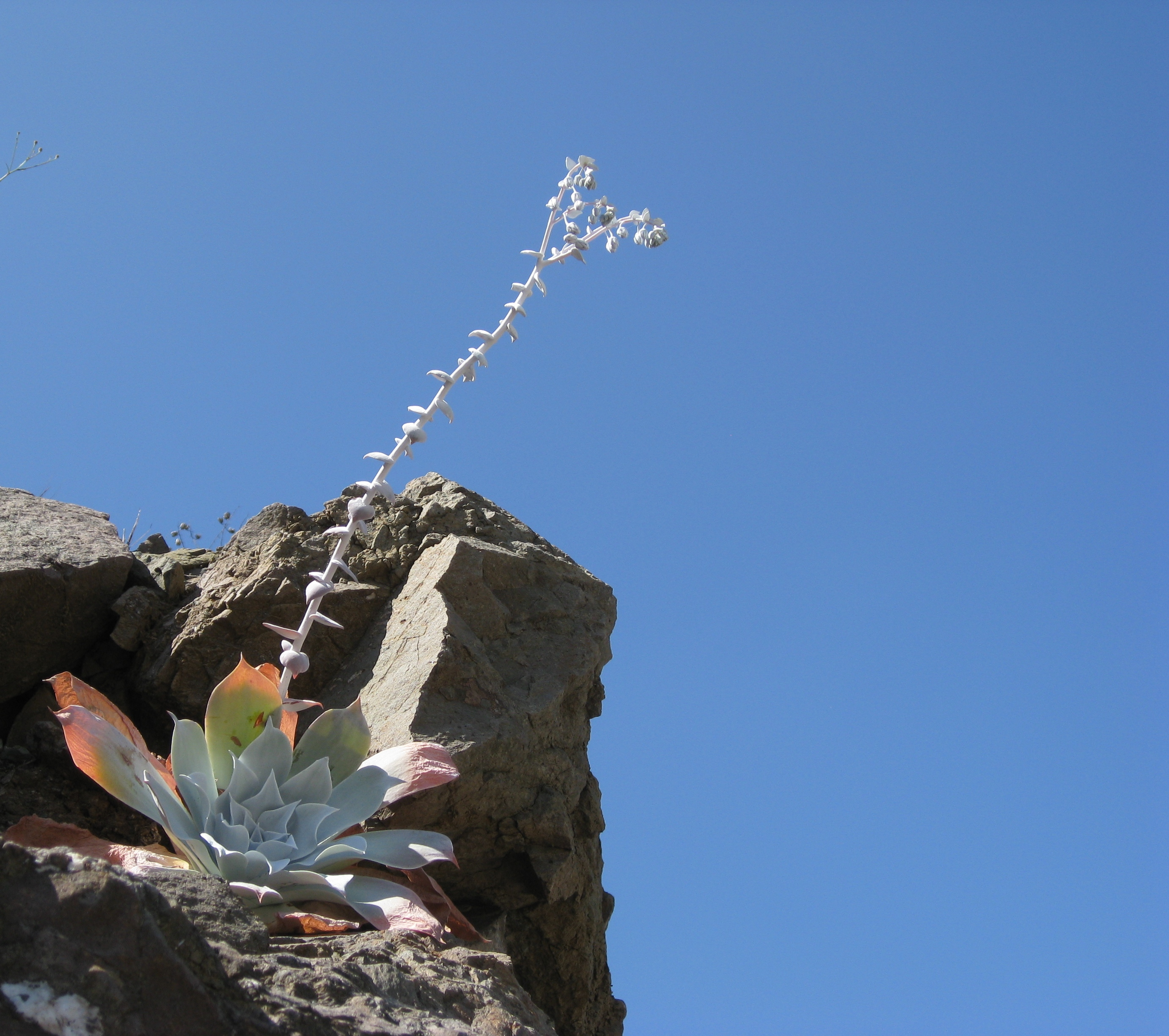 Dudleya pulverulenta i090527 285